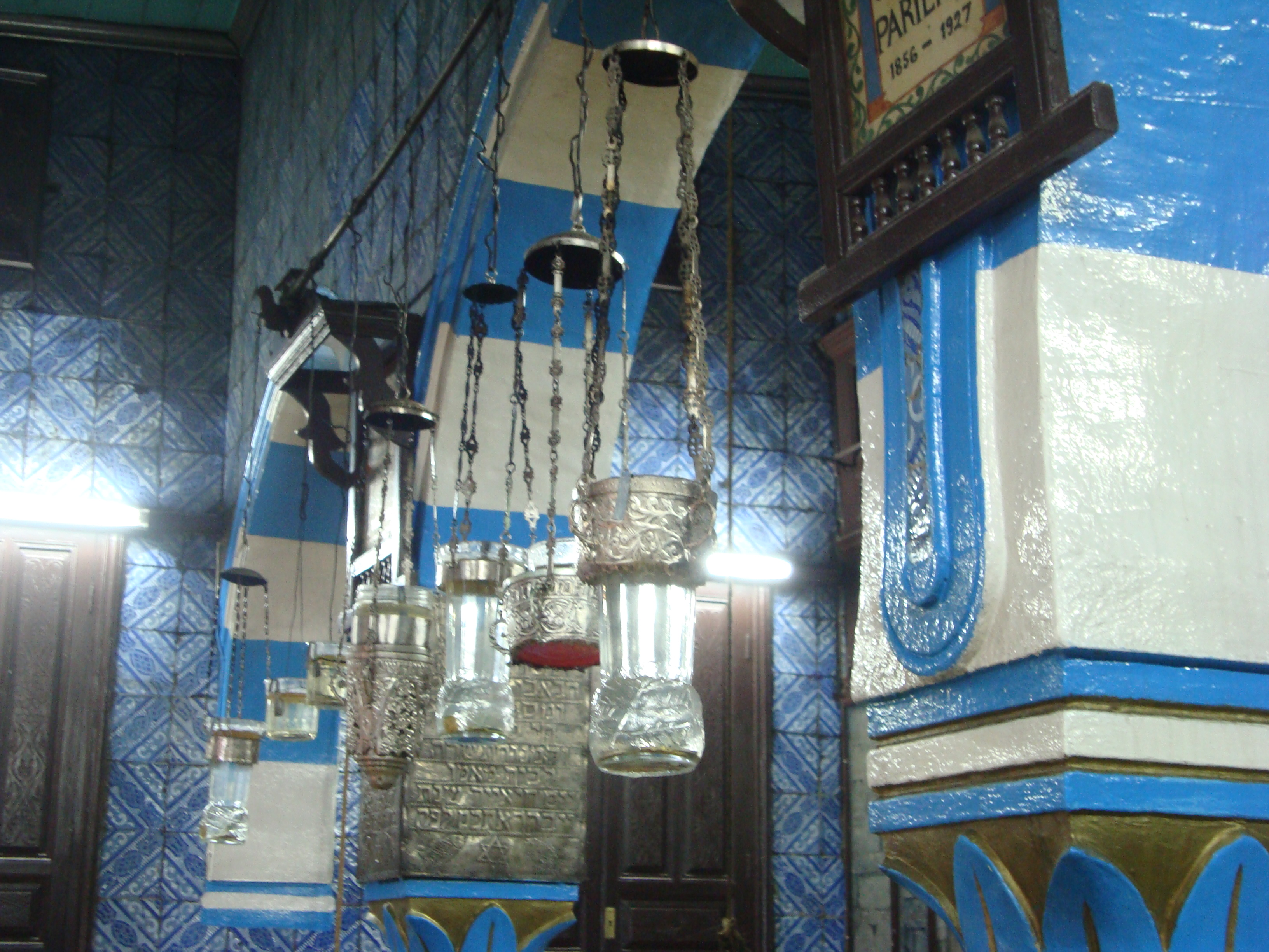 Vue intérieure de la synagogue de la Ghriba sur l'île de Djerba.